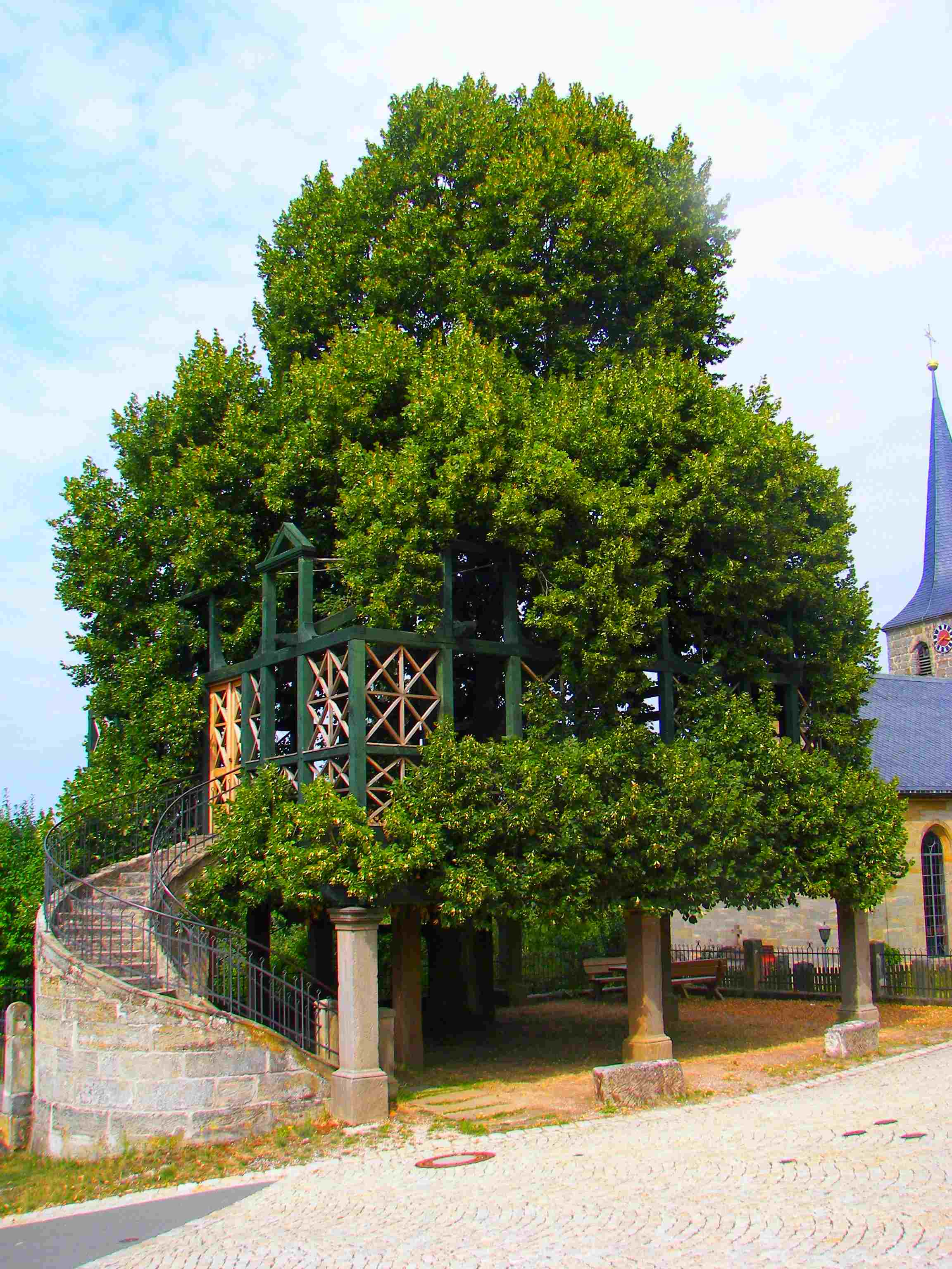 Tanzlinde in Peesten, Ortsteil von Kasendorf